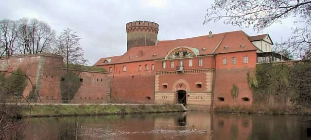 Beschreibung: Foto des Torhaus der Zitadelle Spandau. Quelle: Fotografiert am 22. Dezember 2003 Fotograf: Robert Steffens Auflösung 640 x 289 Pixel Copyright Status: GNU Freie Dokumentationslizenz Kategorie:Bild:Tor